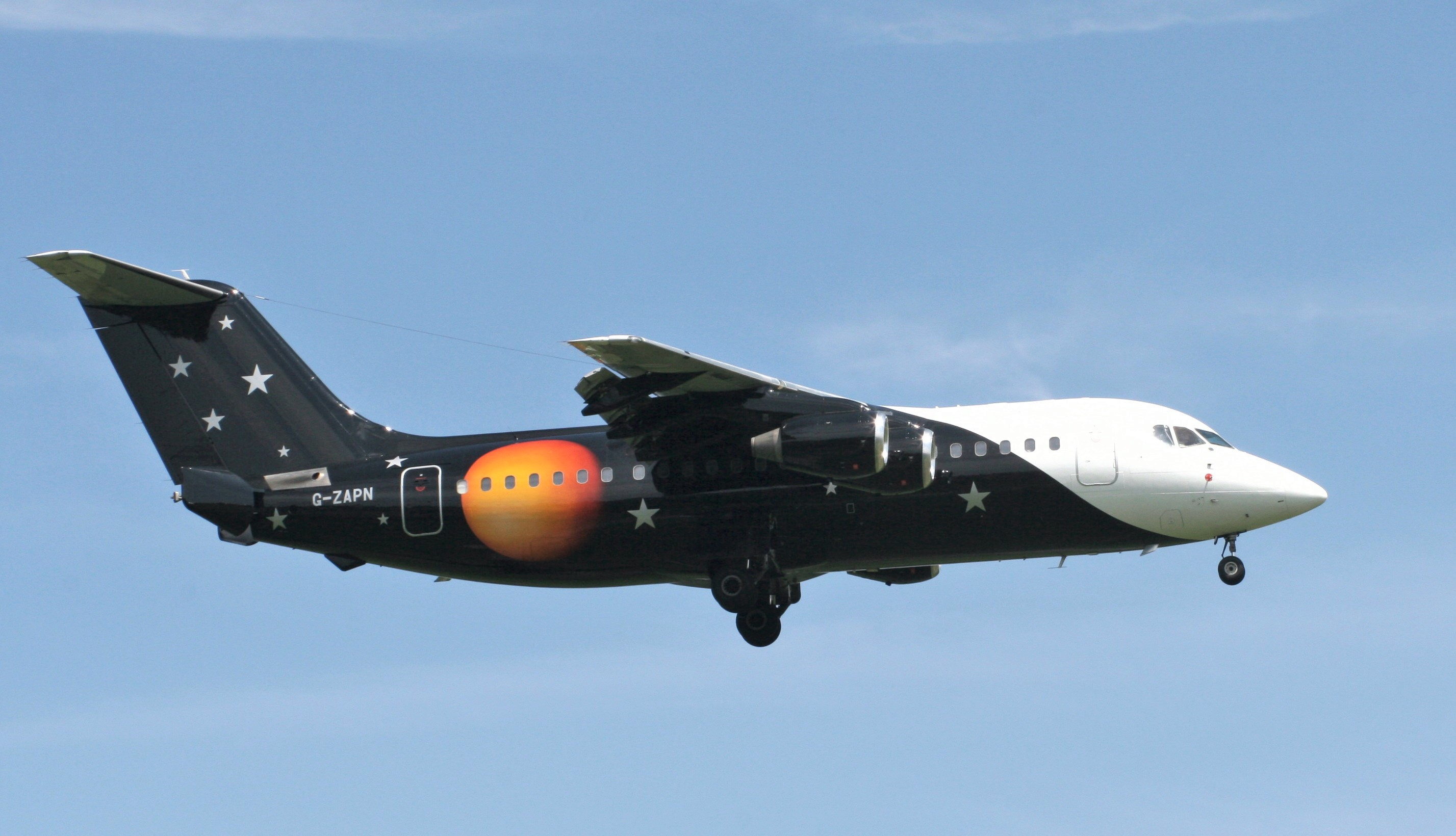 G-ZAPN Bae146-200 Titan Birmingham 02-06-2007